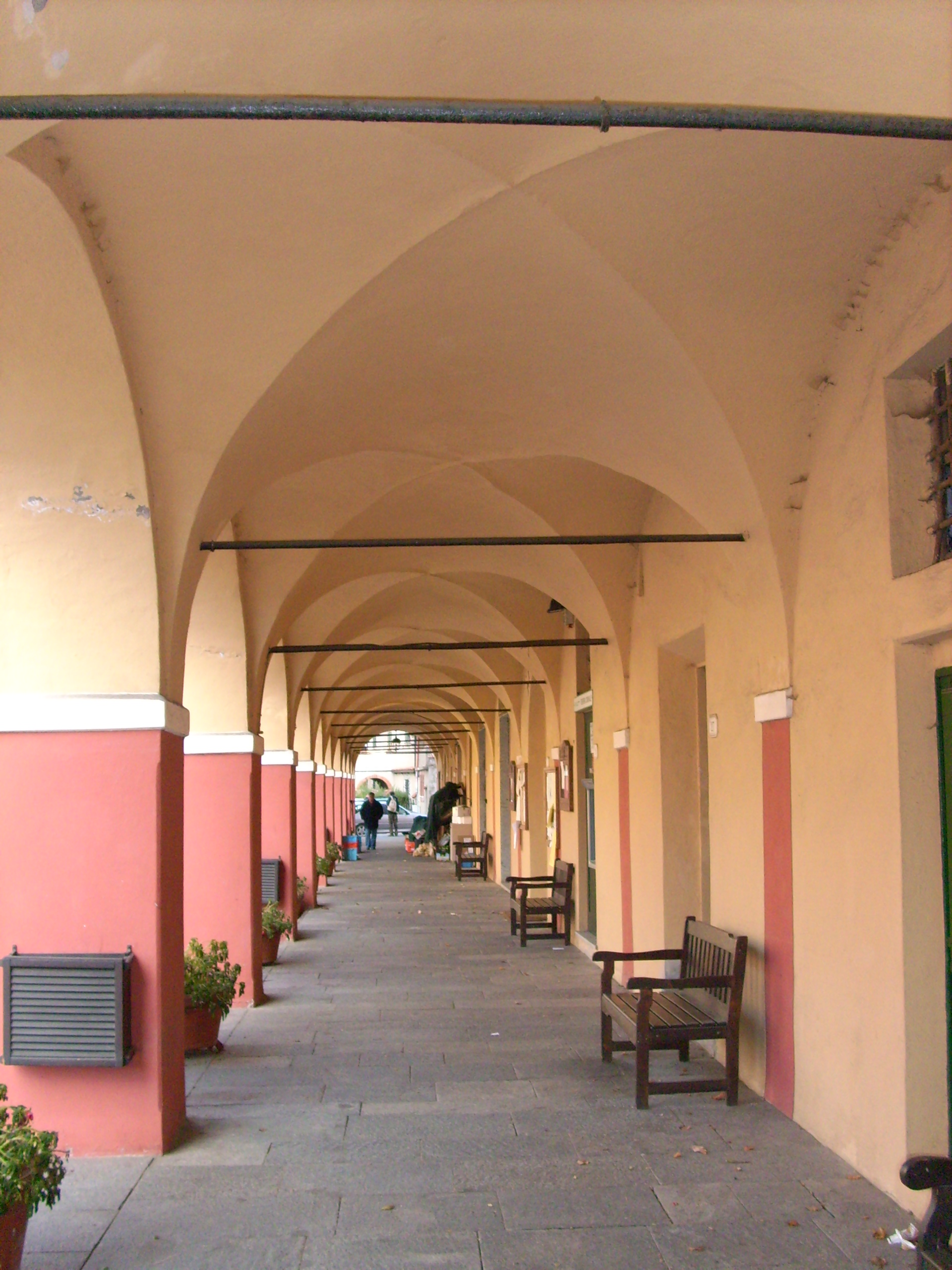 Portici presso Pontinvrea, Liguria, Italia